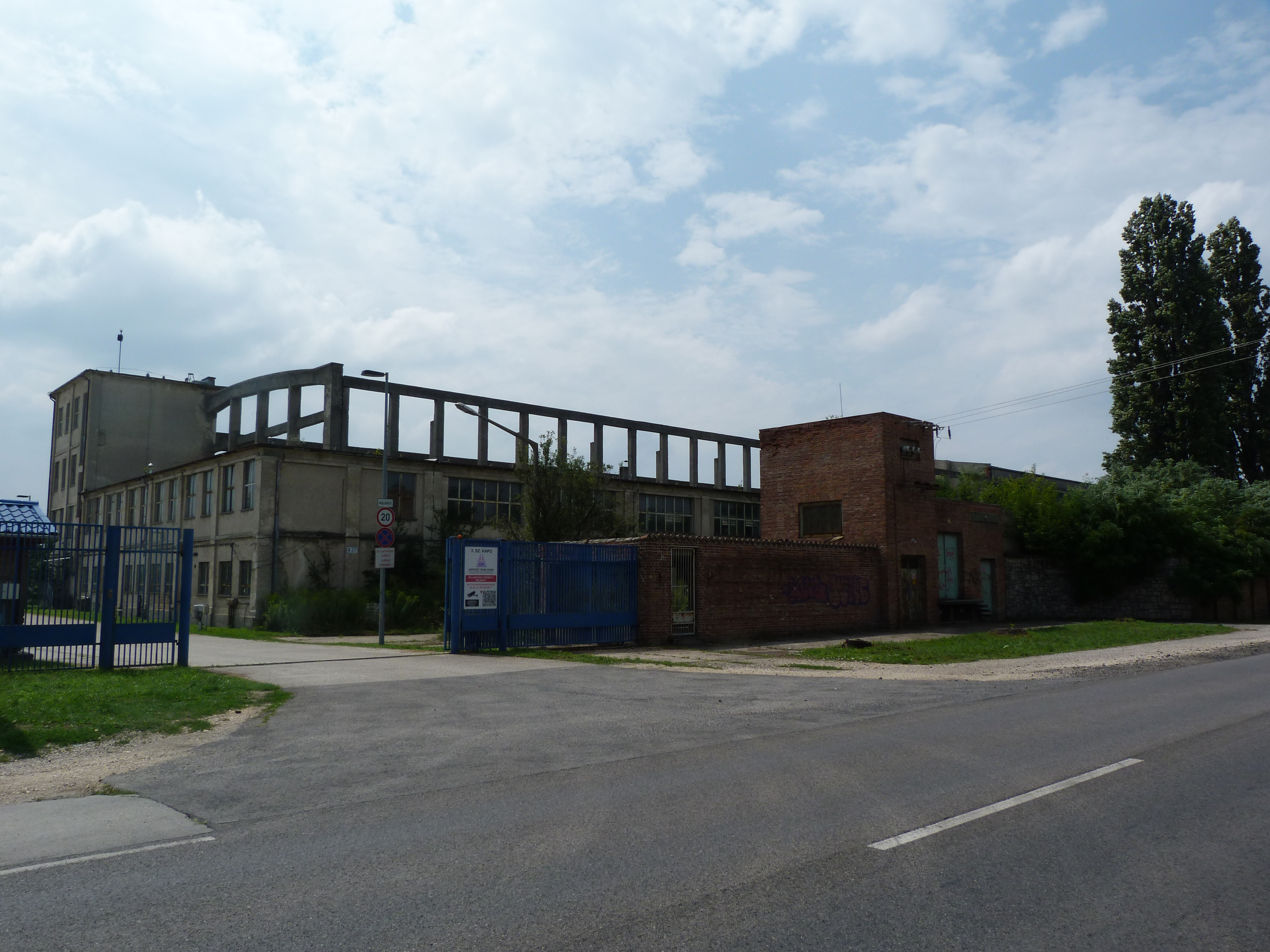 A felvétel 2014. július 30-án készült Tökölön. A Tököli Repülőtér. ©© Derzsi Elekes Andor, Budapest 2014, You are authorised to use these photos and vids under Creative Commons – even for commercial, for profit purposes. Photos must be attributed to Derzsi Elekes Andor. All of the photos and vids in the Metapolisz DVD line are under Creative Commons and can be used even for commercial – for profit – purposes. Recommended Citation Derzsi Elekes Andor: Metapolisz DVD line